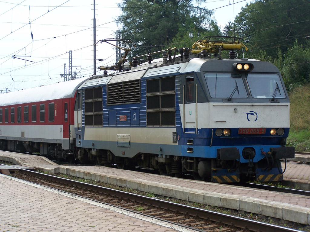 Zug in Štrba (SK)